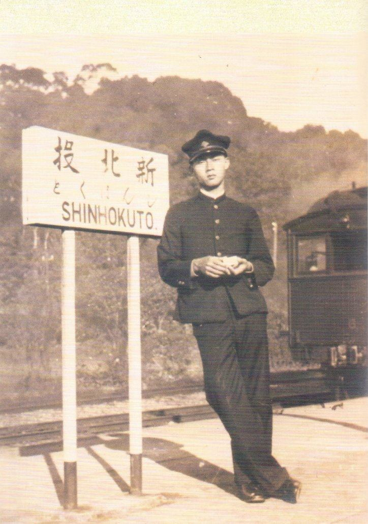 洪孔達於1934年就讀台北醫專（今台大醫學院）時出遊，於台鐵新北投站月台拍攝